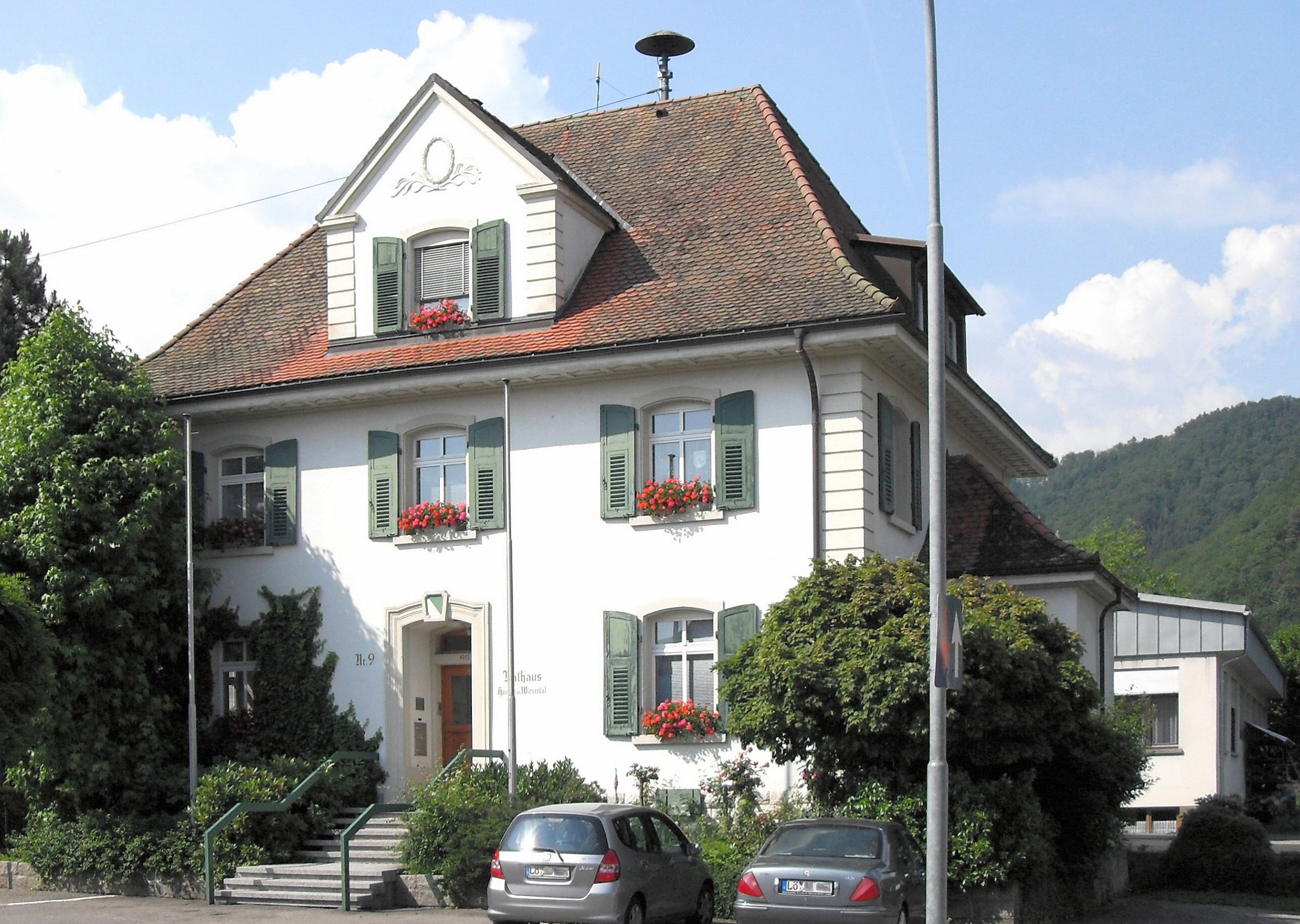 rathaus in Hausen im Wiesental, Schwarzwald, Deutschland